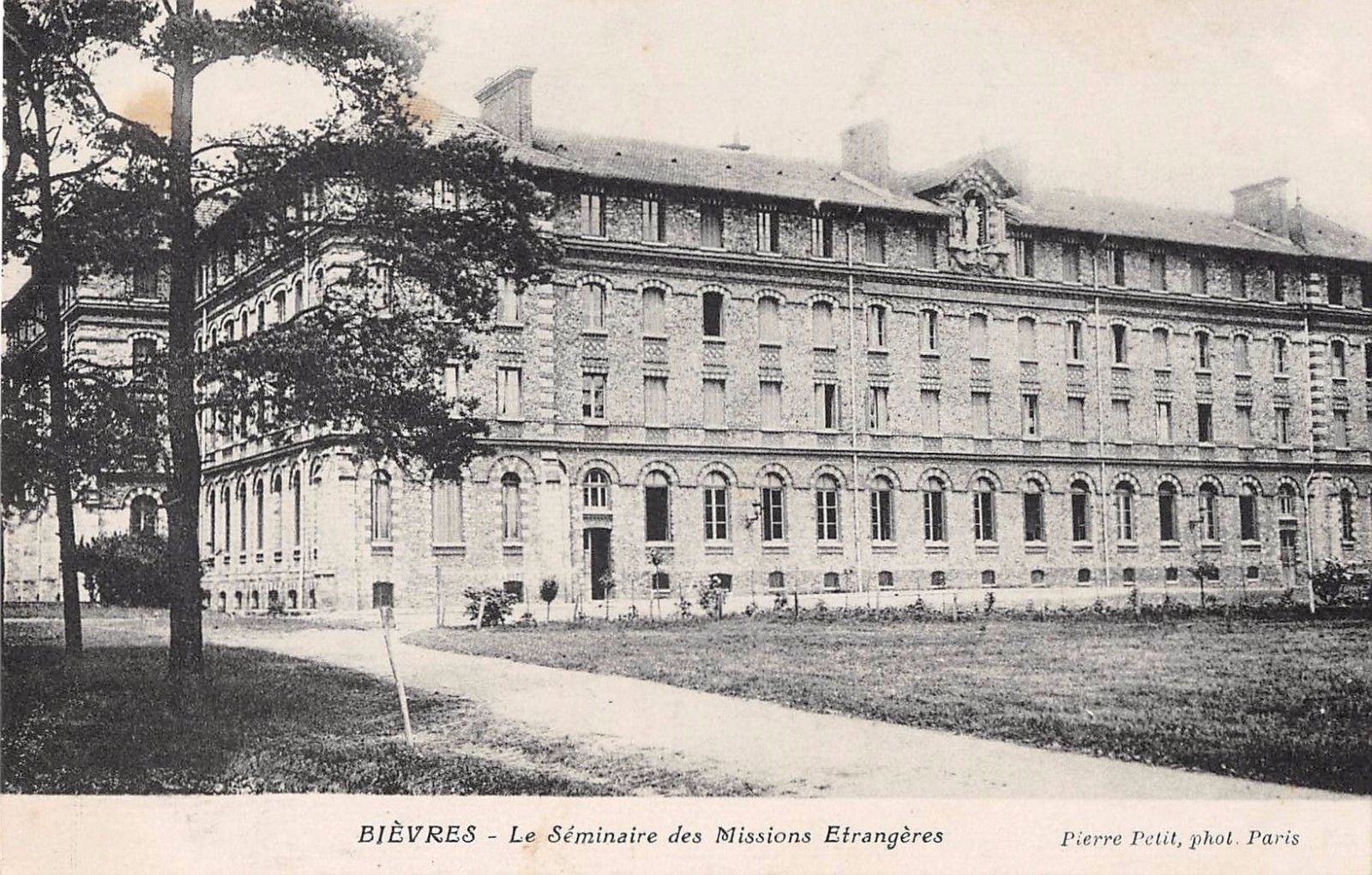 Séminaire de Bièvres des missions étrangères de Paris, installé en 1890.